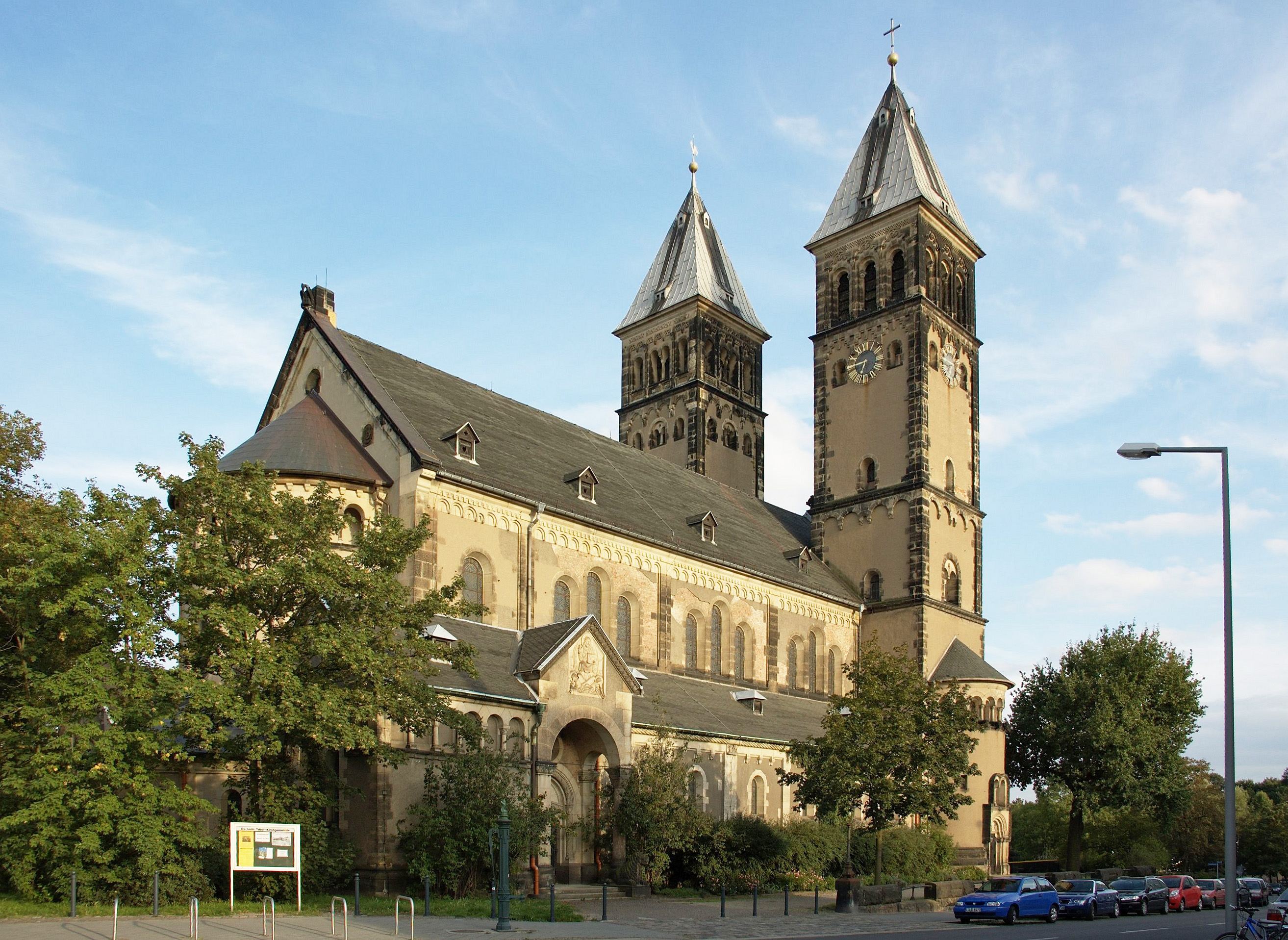 evangelische Taborkirche in Leipzig-Kleinzschocher